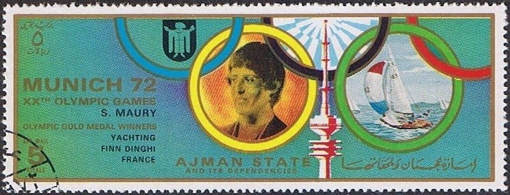 Serge Maury